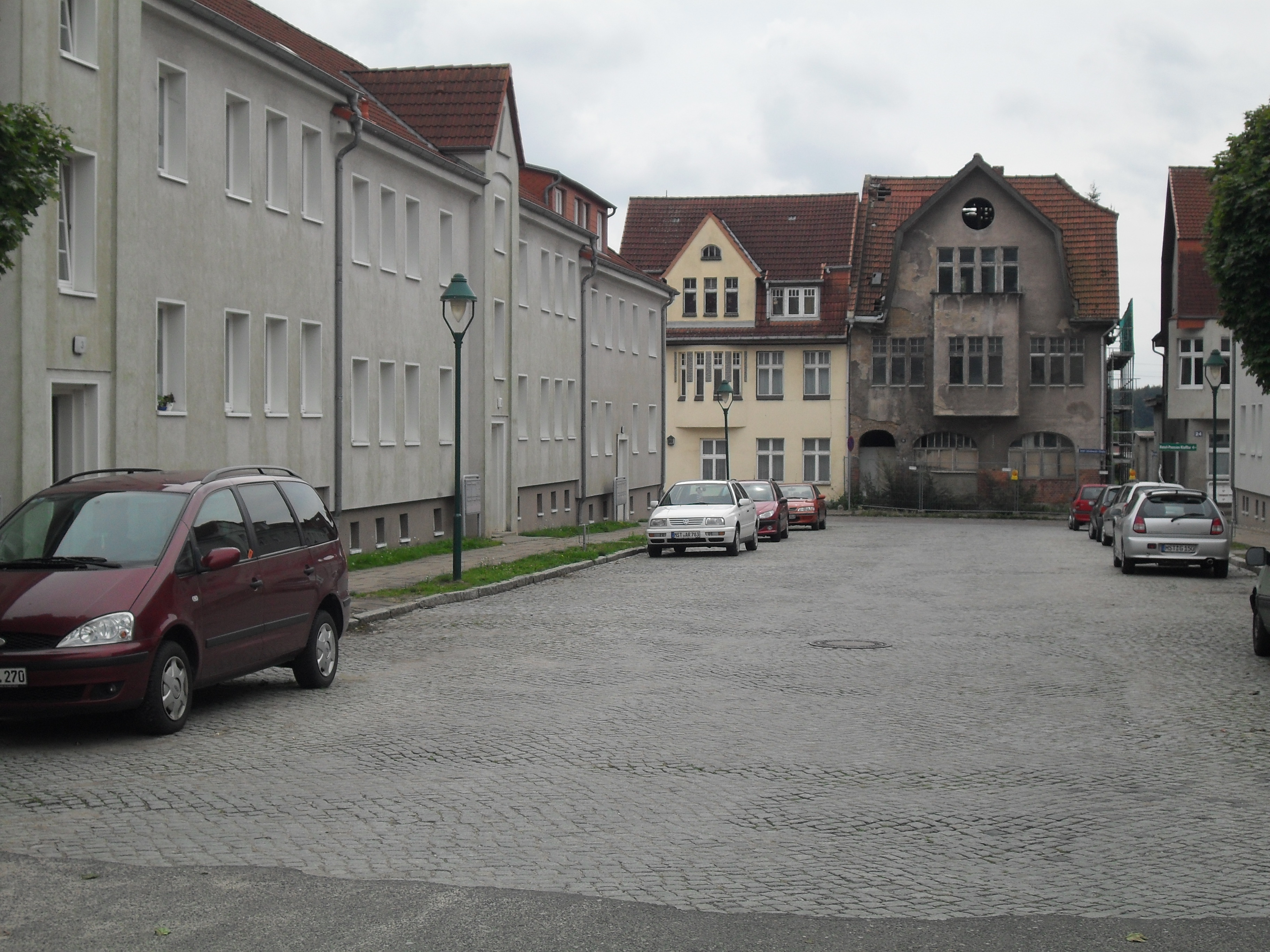 Im April 1945 – kurz vor Ende des Zweiten Weltkrieges – wurde der historische Kern von Altstrelitz nach heftigen Kämpfen durch Brandstiftung fast völlig zerstört, darunter die Marienkirche und das Rathaus. Diese Gebäude wurden nicht wieder aufgebaut. Auf den Grundstücken dieser zerstörten Gebäude wurden stattdessen Wohngebäude errichtet.